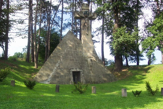 Zagórzany - mauzoleum Skrzyńskich, zaprojektowane przez Mariana Teodora Talowskiego. W mauzoleum spoczywa m.in. hr. Aleksander Józef Skrzyński